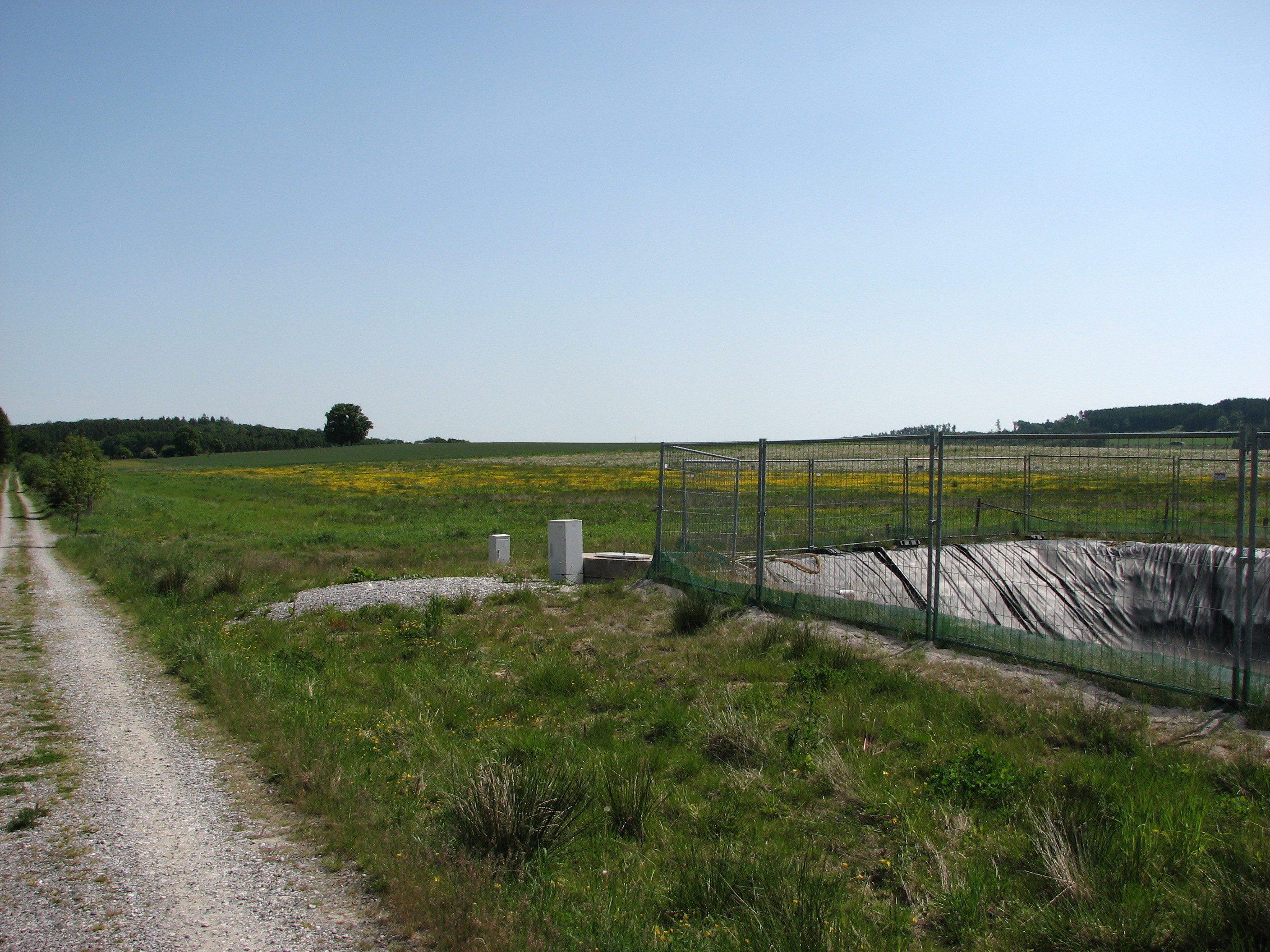 Drainage der mit perfluorierten Tensiden belasteten Fläche in Brilon-Scharfenberg, rechts das Sammelbecken (Bericht)